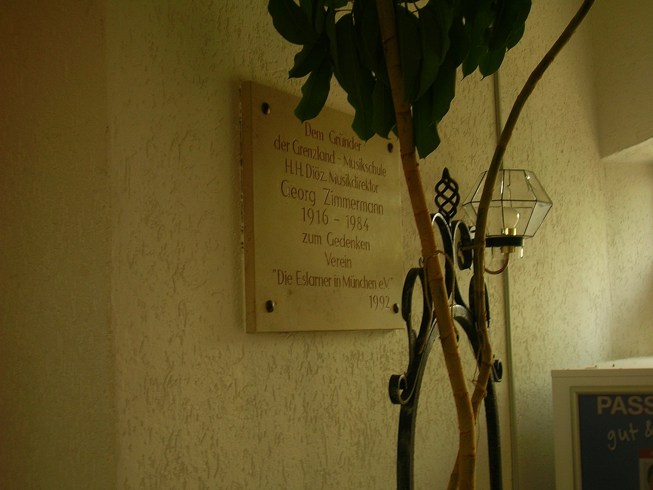 Gedenktafel vom Heimatverein "Die Eslarner in München" zu Ehren dem Gründer der Grenzland-Musikschule Eslarn, Diözesan-Kirchenmusikdirektor Georg Friedrich Zimmermann. Jahr 1992. Rathaus-Foyer 92693 Eslarn.